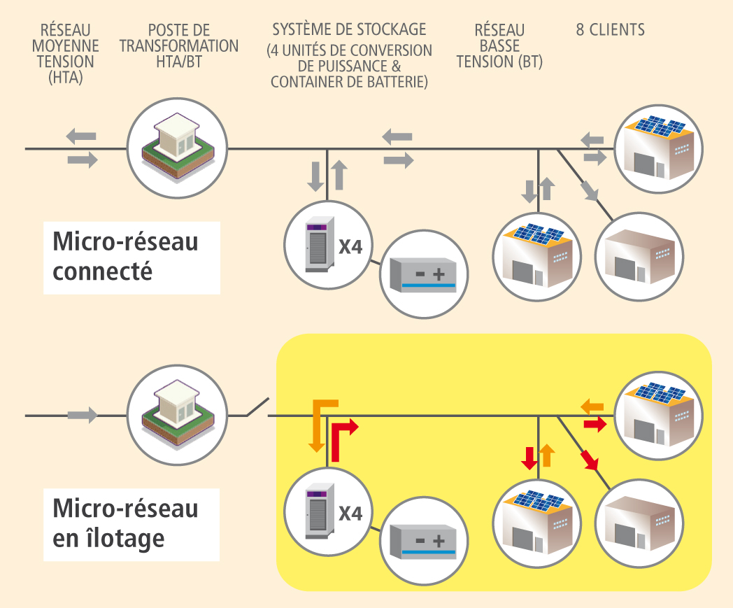 Schéma Ilotage